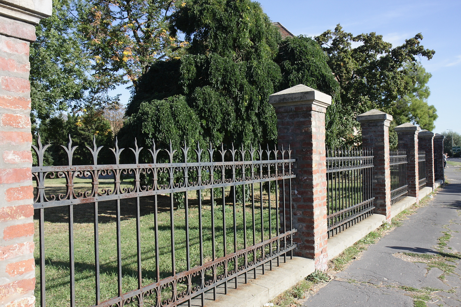 Öntöttvas kerítés (Szombathely, 11-es Huszár út 40.) This is a photo of a monument in Hungary. Identifier: 13882